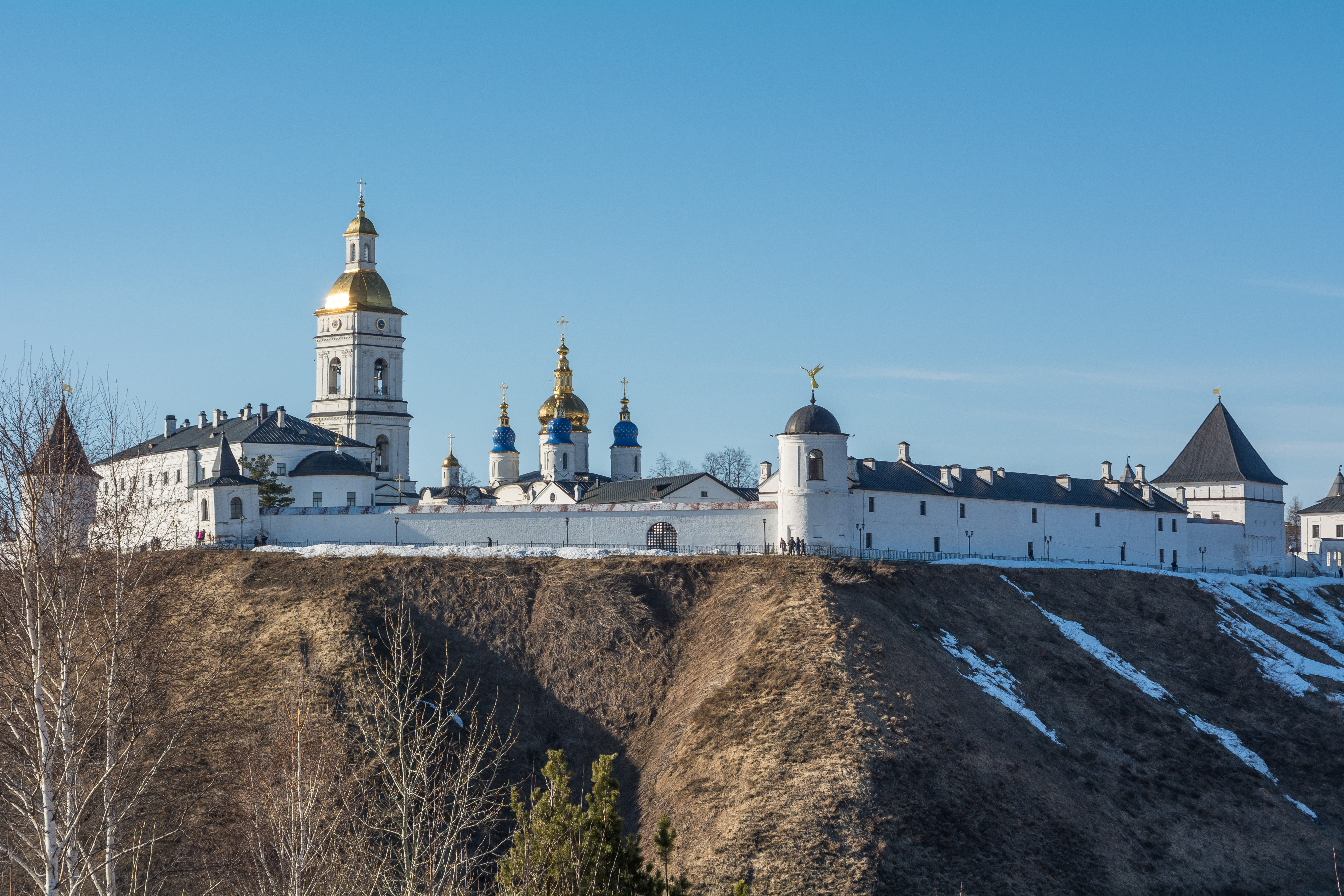 Ансамбль Кремля и Менового двора (Тобольский государственный историко-архитектурный музей-заповедник): площадь Красная, 2, Тобольск, Тюменская область